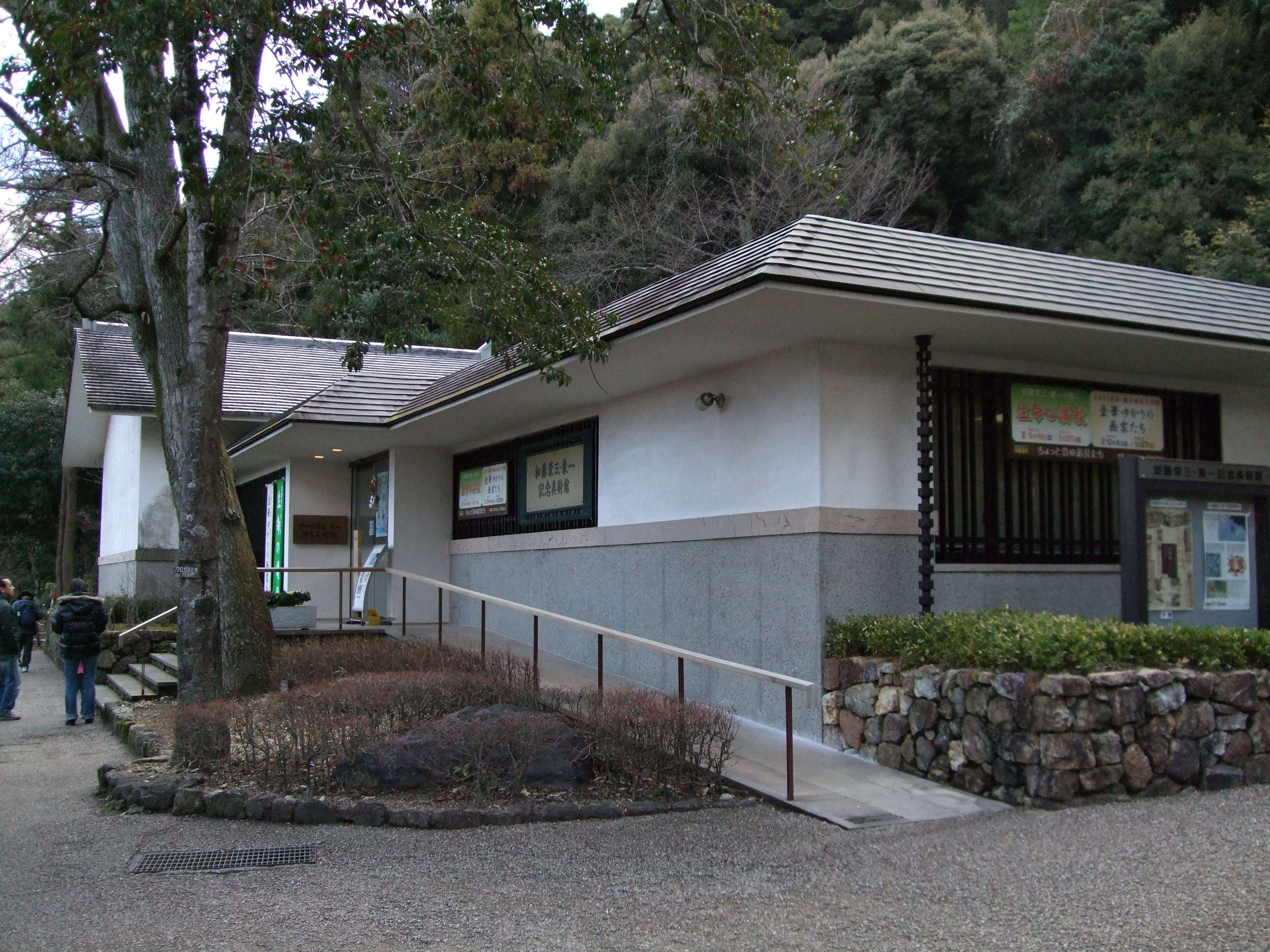 Kato_Eizou_Touichi_art_museum in Gifu,Japan